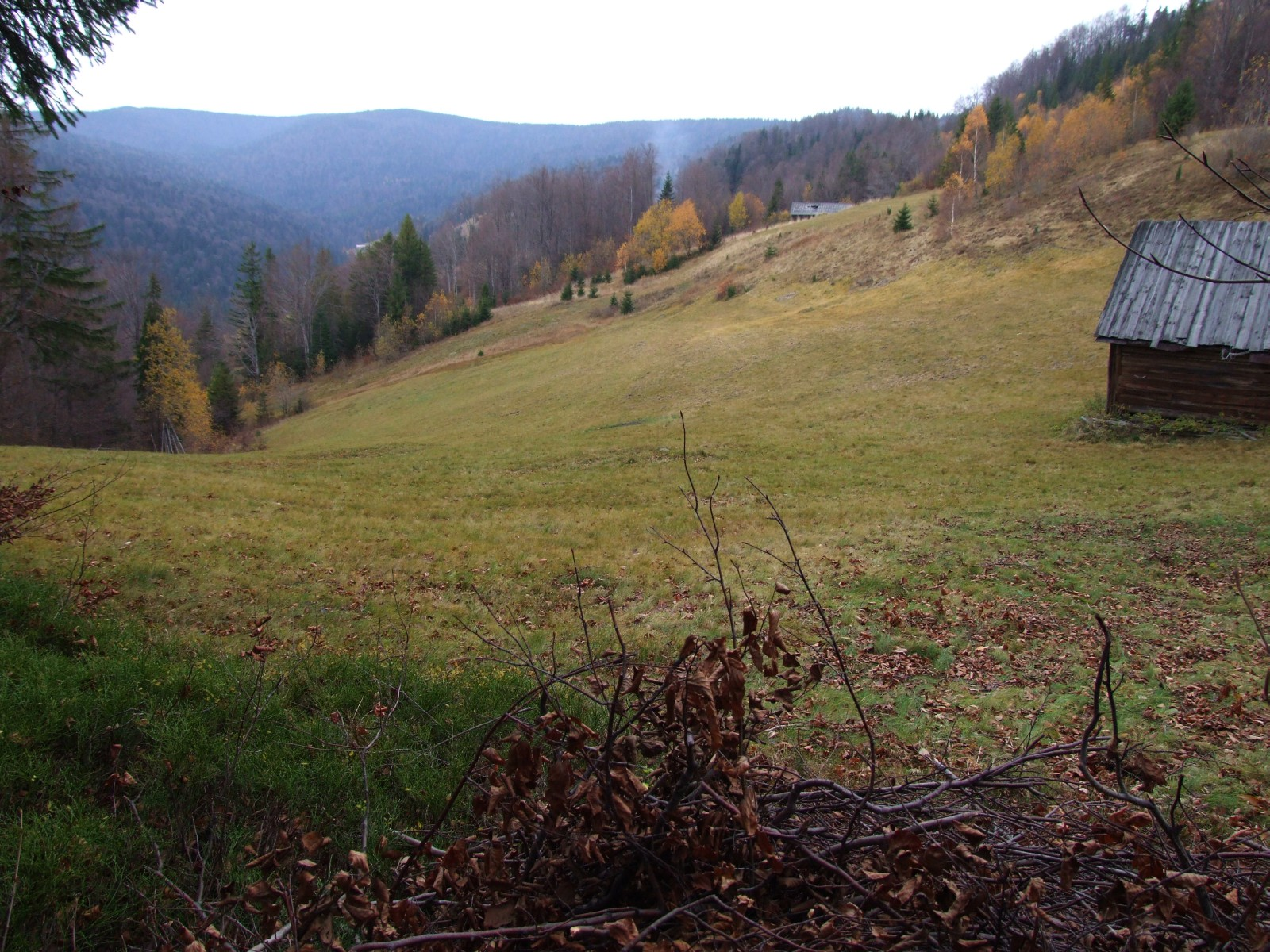 Polana Kosarzyska w Gorcach (Ochotnica Górna)